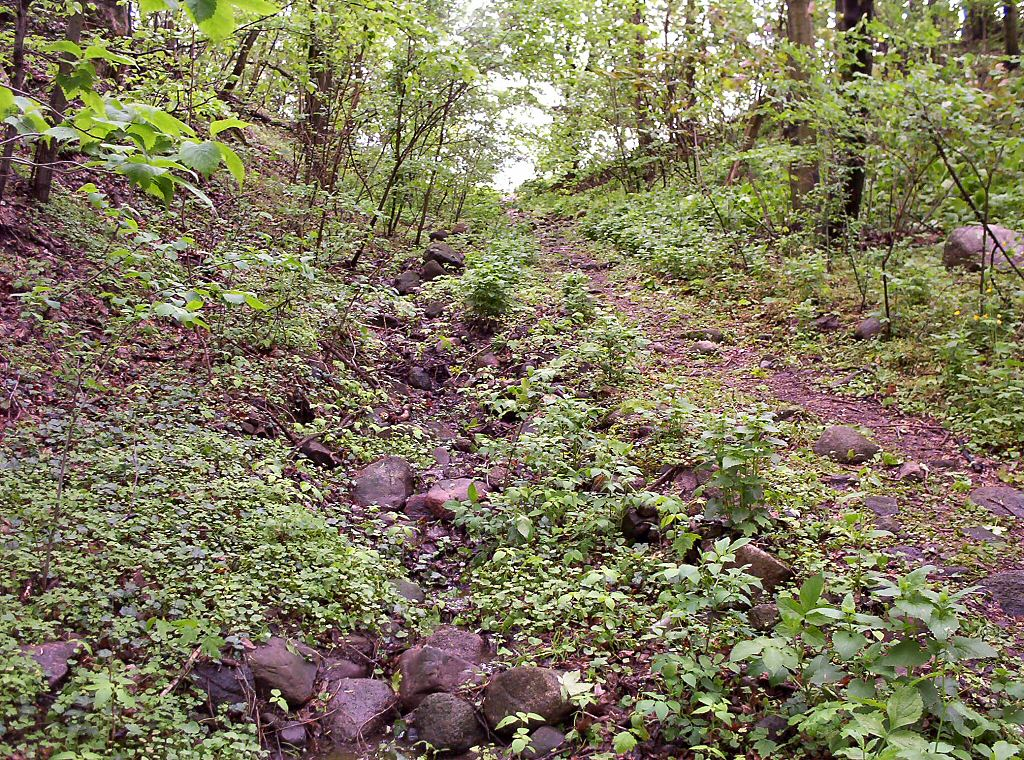 Rezerwat Przyrody "Skalisty Jar Libberta" (gmina Barlinek, woj. zachodniopomorskie)